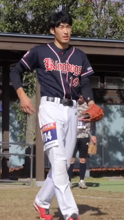 2019年11月4日、第3回 強肩王®決定戦 IN TOTTORI 2019（コカ・コーラボトラーズジャパンスポーツパーク）に参加する杉浦健二郎